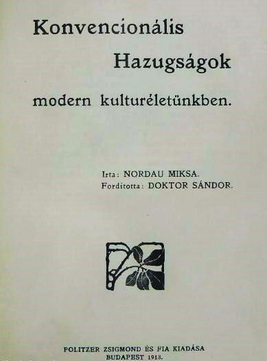 Max Nordau (1849-1923): Konvencionális Hazugságok modern kulturéletünkben